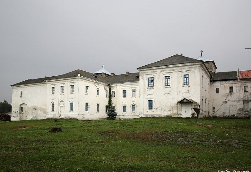 Юравіцкі кляштар езуітаў